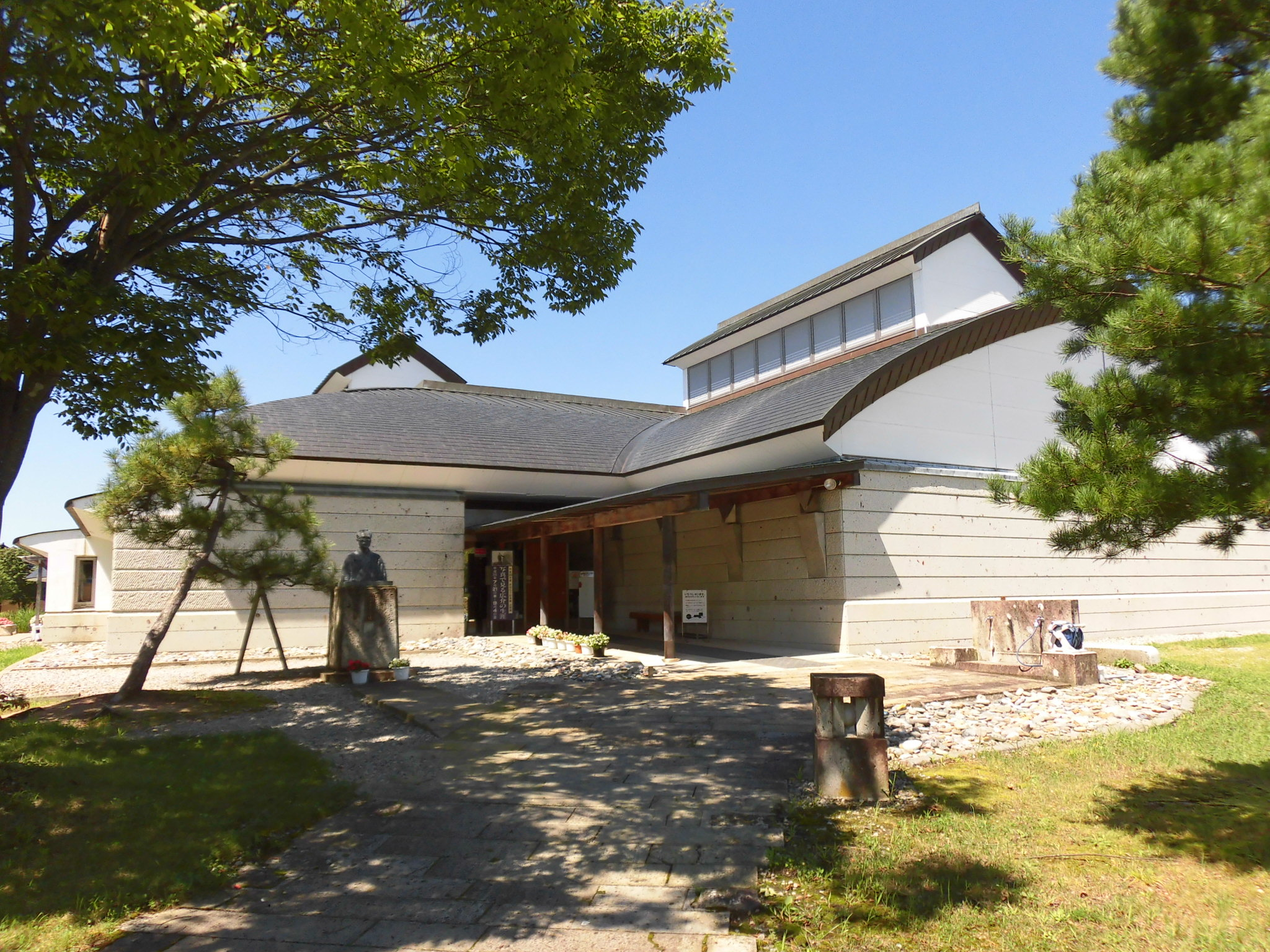 まほろば・童話の里 浜田広介記念館。山形県東置賜郡高畠町に所在。